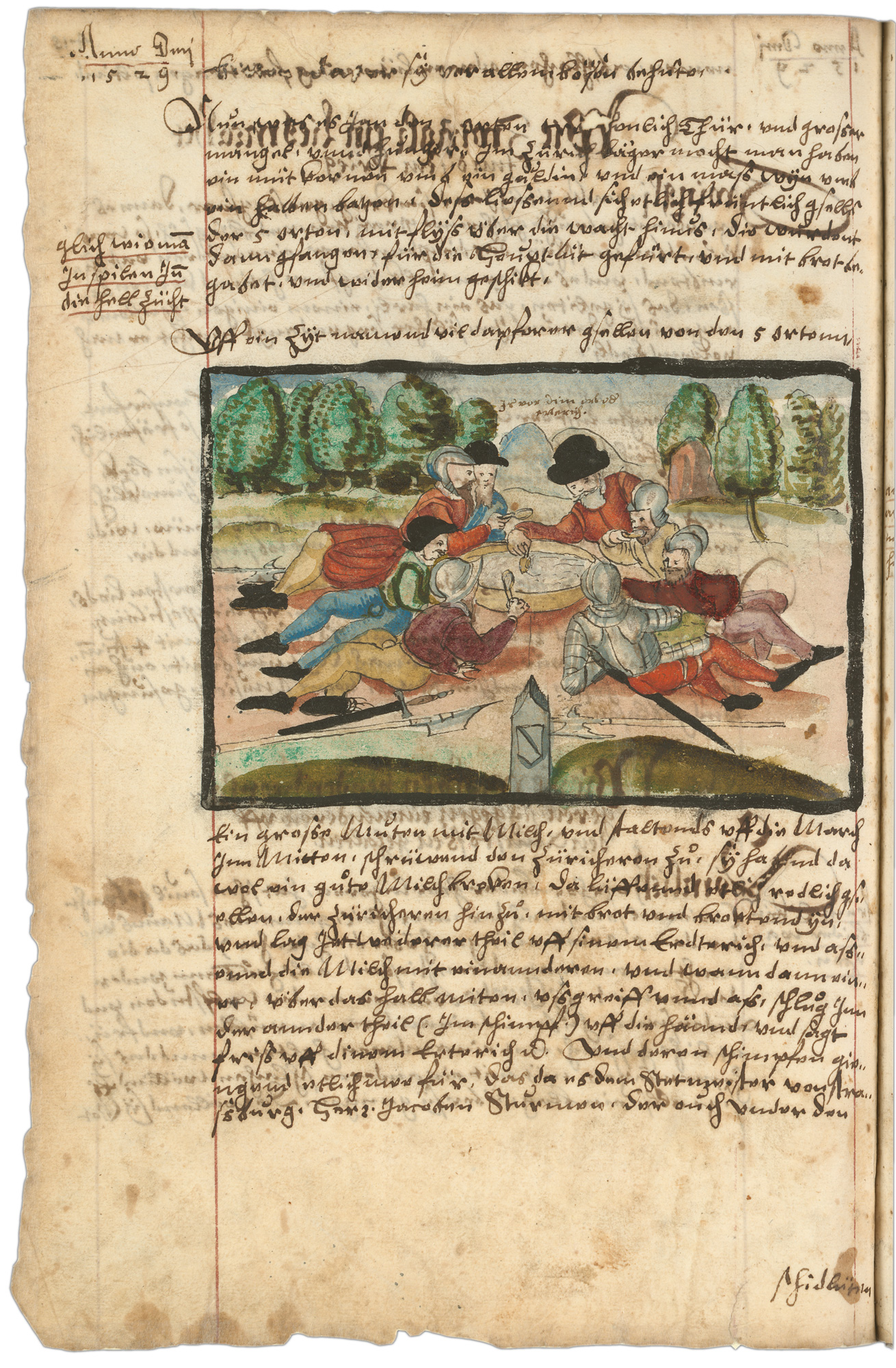 «An der Grenze zwischen Zug und Zürich essen im Juni 1529 Krieger von beiden Seiten aus dem gleichen Topf eine Suppe aus Milch und Brot». Kopienband zur zürcherischen Kirchen- und Reformationsgeschichte (Heinrich Bullinger u.a.), von der Hand von Heinrich Thomann, 1605-1606.